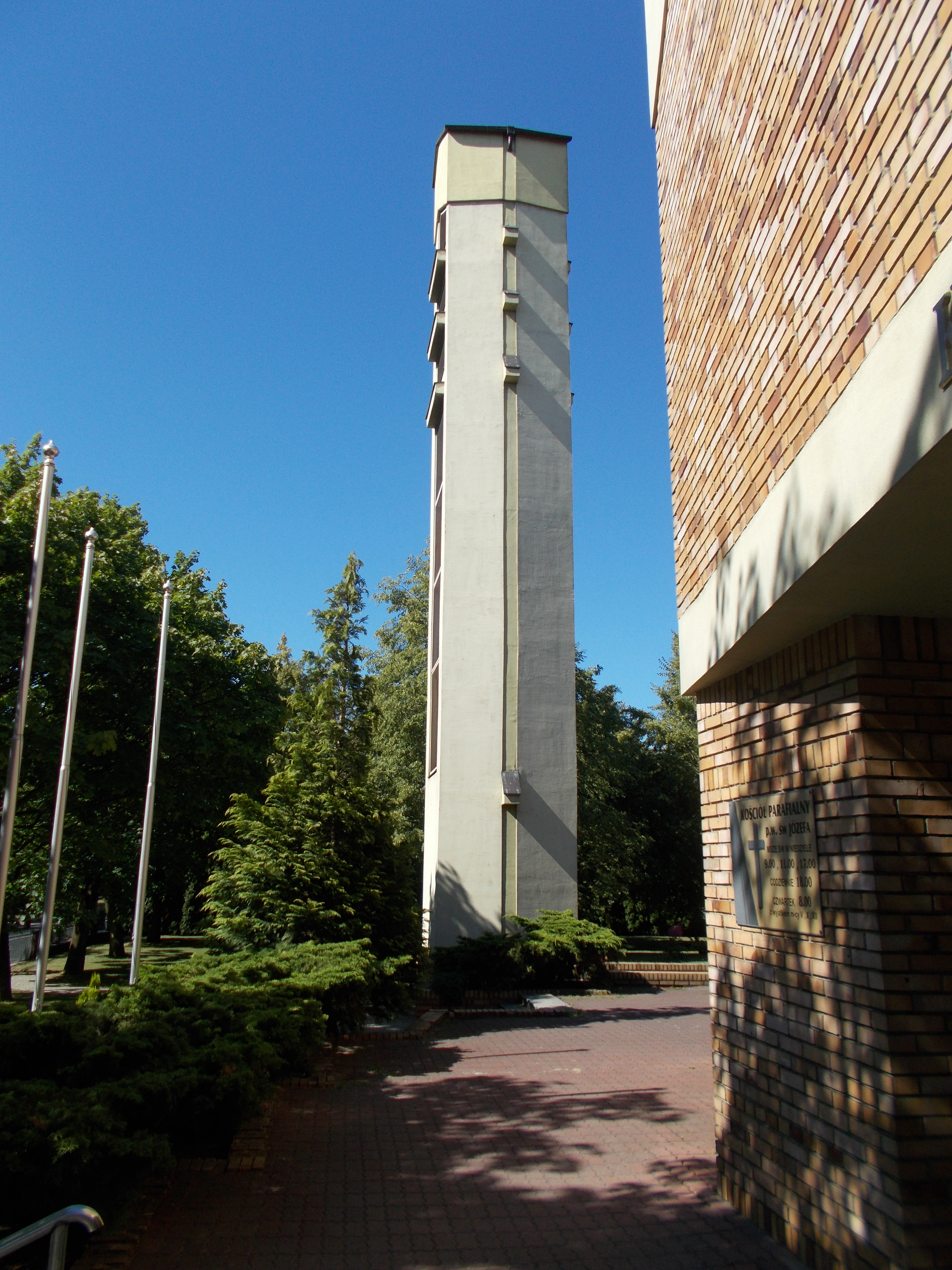 Dzwonnica przy kościele pw. św. Józefa w Poznaniu